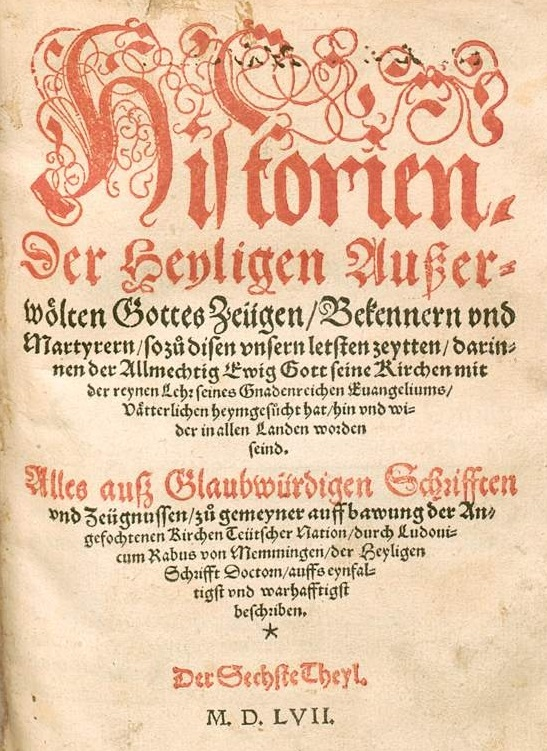 Ludwig Rabus: Historien_der_Heyligen_Auserwählten Gottes Zeugen Bekenner und Märtyrer, Teil VI, Straßburg 1557